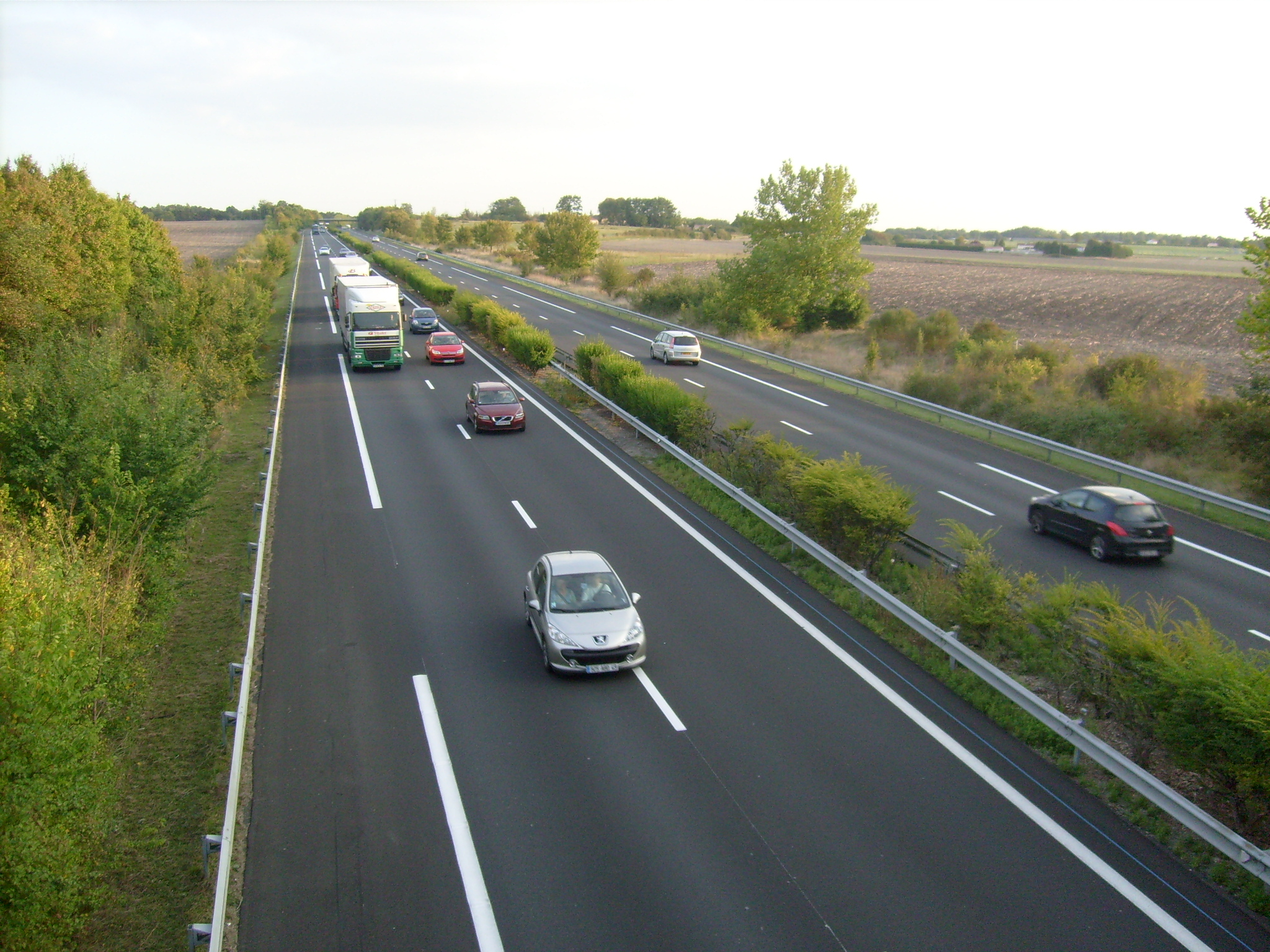 L'autoroute A10 à quelques kilomètres au sud de la rocade de Saintes